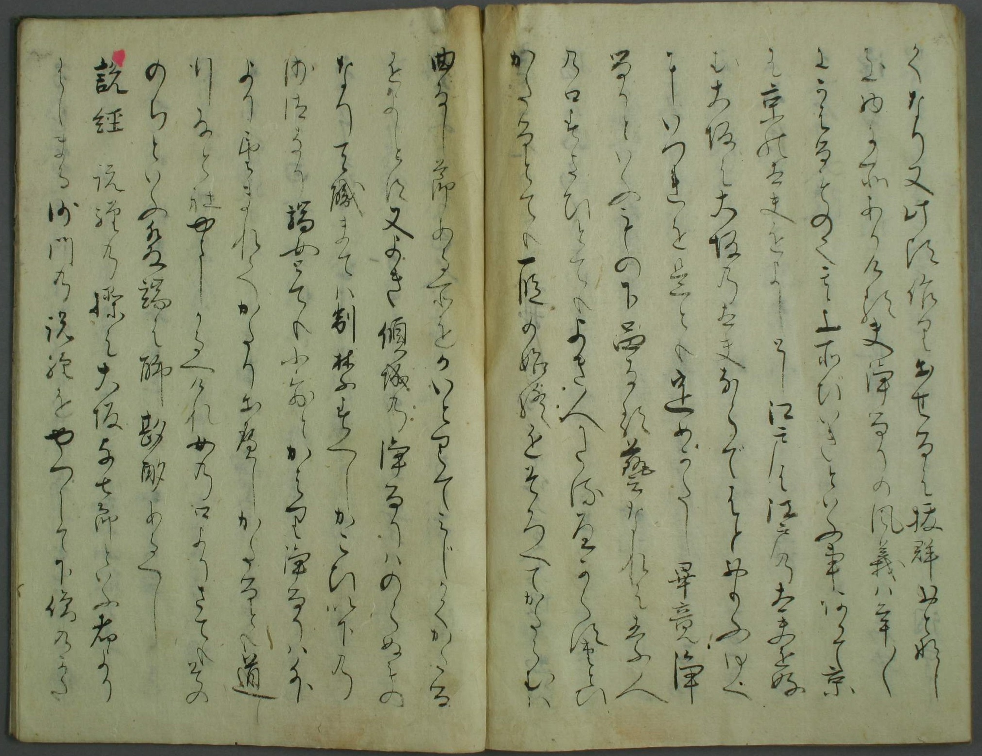 畠山其山撰『色道大鏡』（Shikido-Okagami、1678年）巻八より